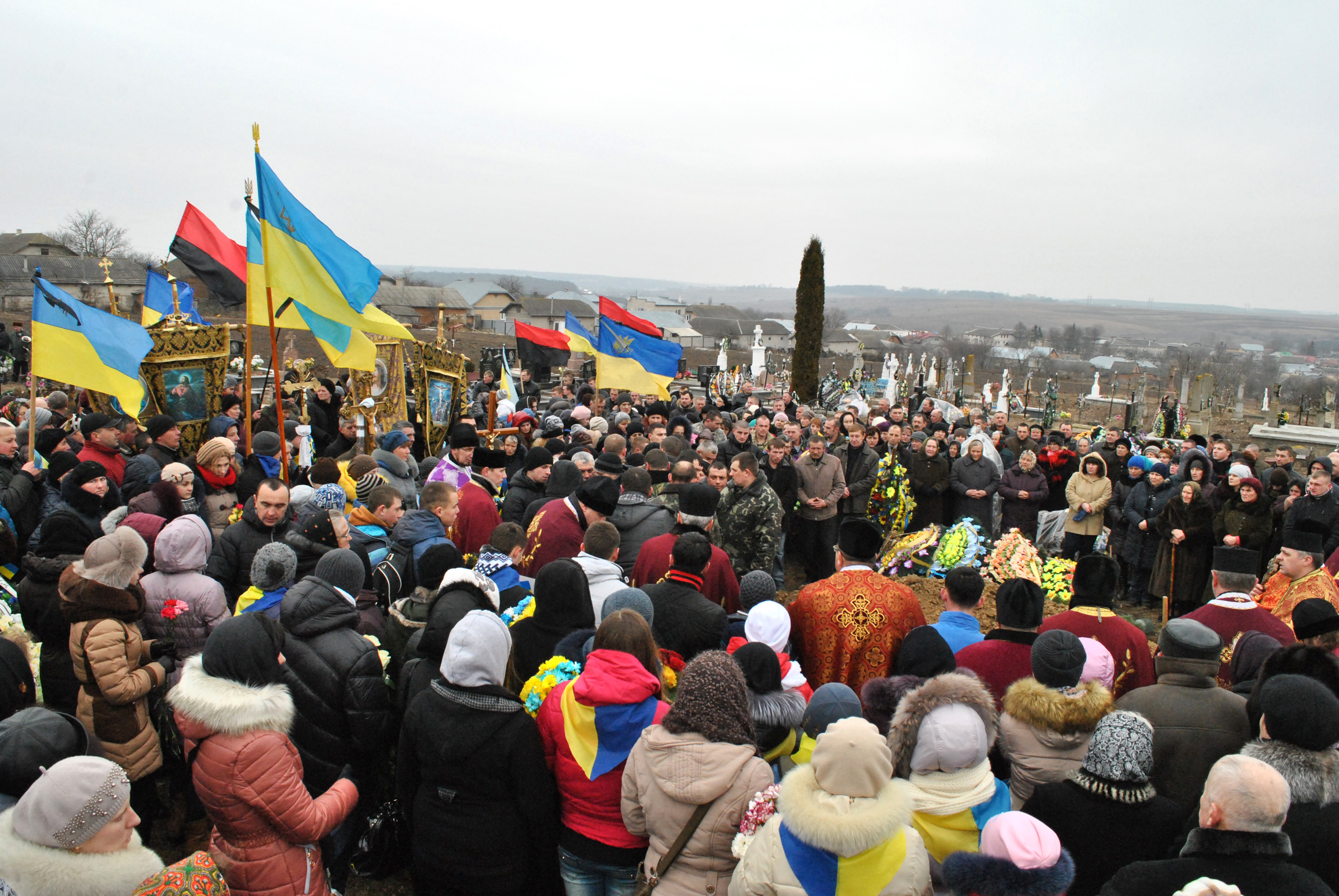 Похорон героя-«кіборга», військовослужбовця 80-ї окремої аеромобільної бригади Івана Вітишина на цвинтарі с. Велика Лука Тернопільського району Тернопільської області.